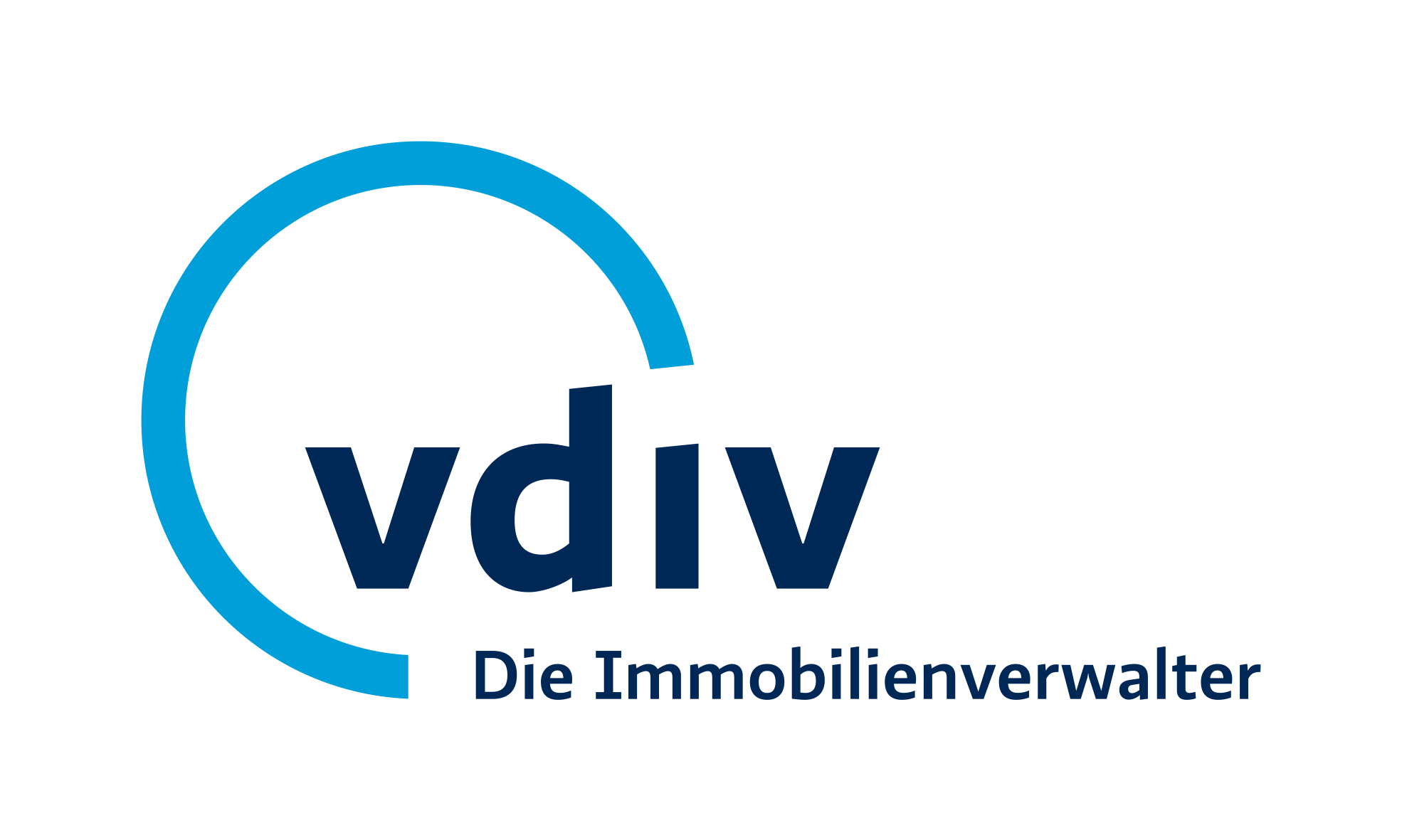 Logo VDIV Deutschland